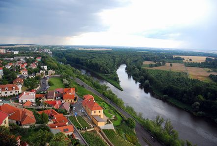 Soutok Labe (vlevo) s Vltavou (vpravo) pod Mělníkem a Polabí. Pohled z věže chrámu sv. Petra a Pavla.